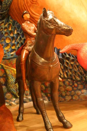 石丸雅通氏作品・動物シリーズ。 Ishimaru Musium by Ishimaru Masamichi.